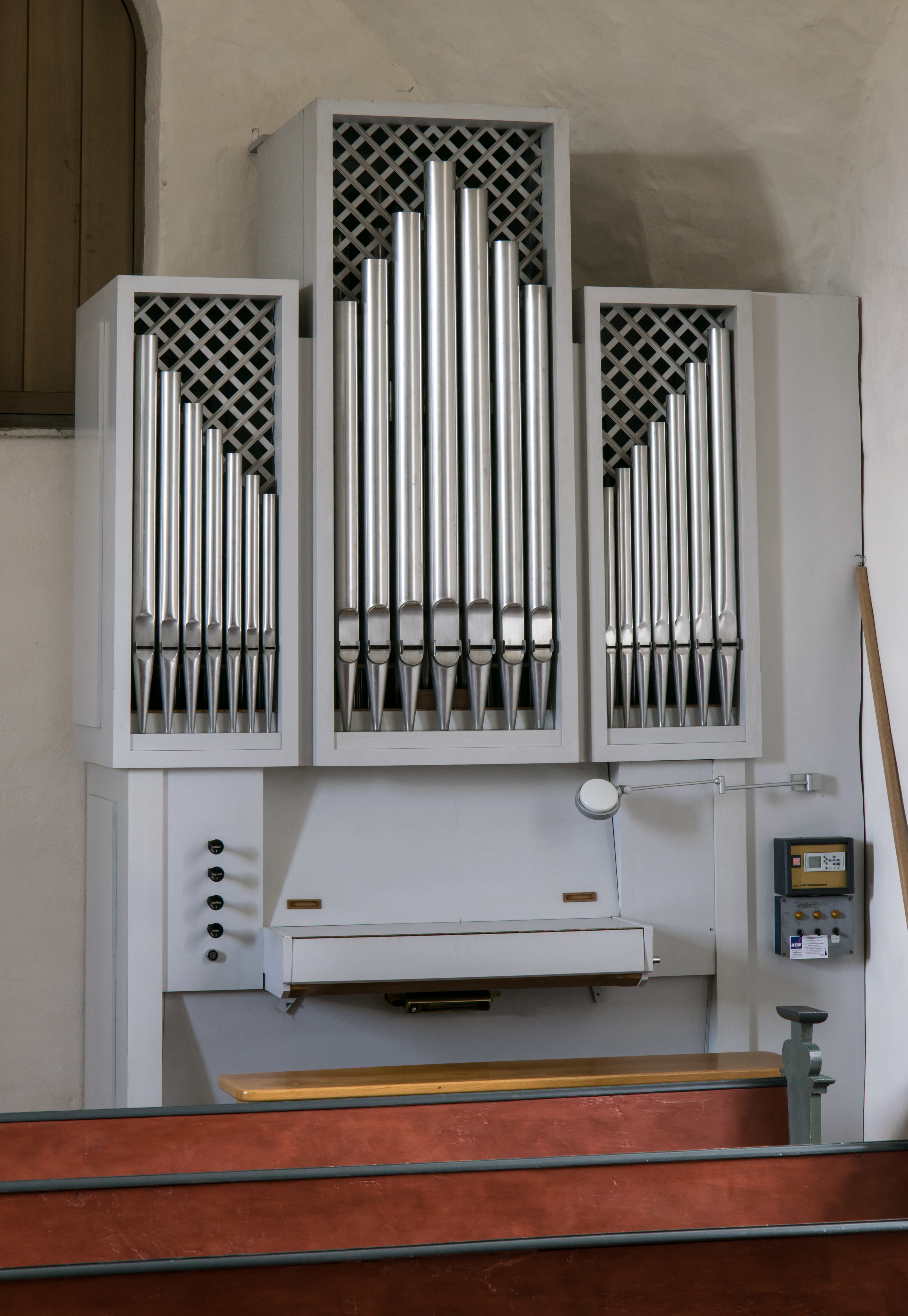 Welleringhausen Abrahamskirche Orgel